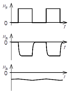 Rechteckspannung und ihre Mittelwertbildung bei zwei verschiedenen Frequenzen